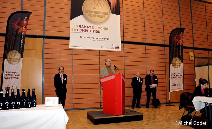 Photo concours gamay